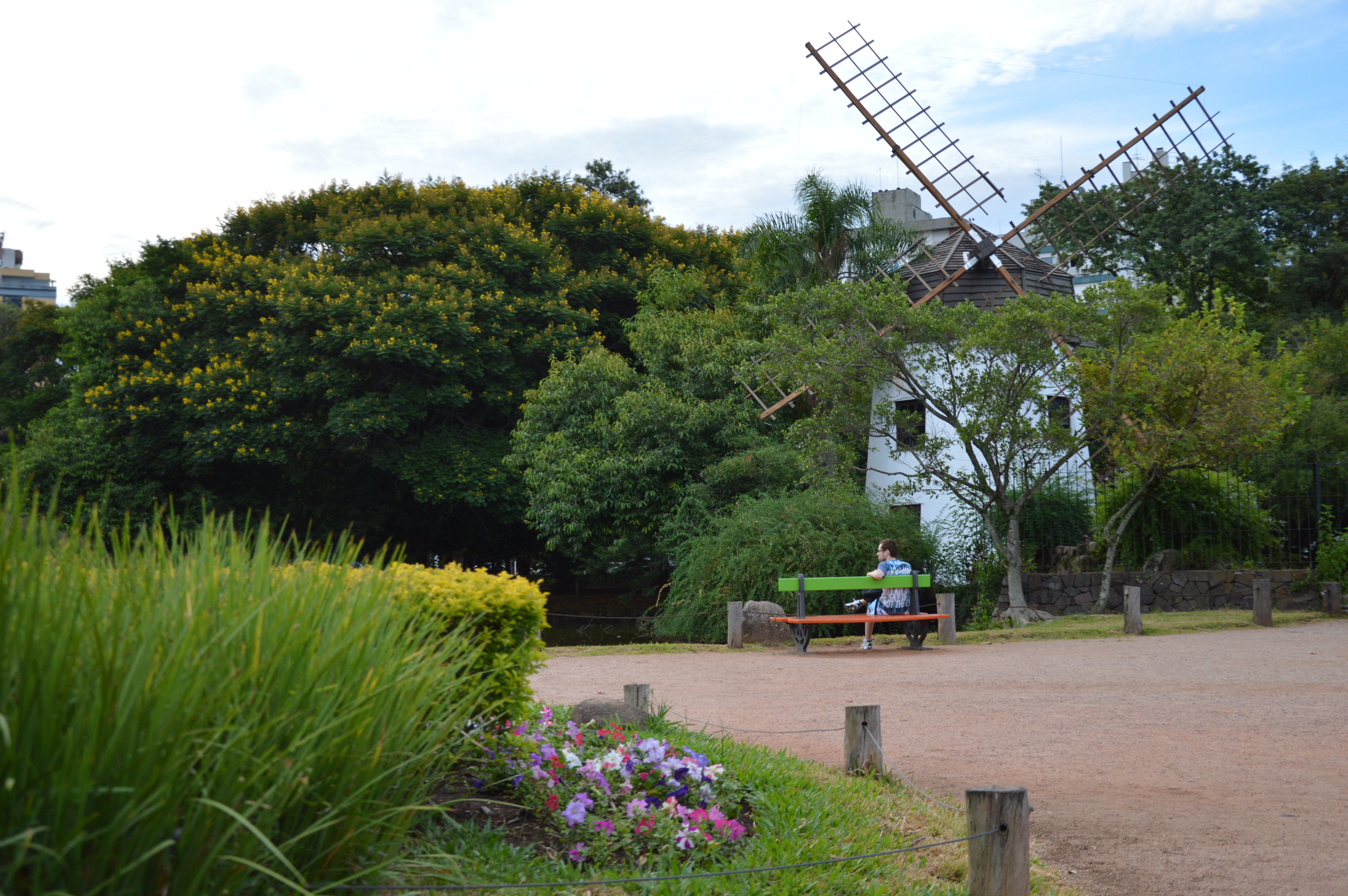 Moinho açoriano no Parque Moinhos de Vento em Porto Alegre